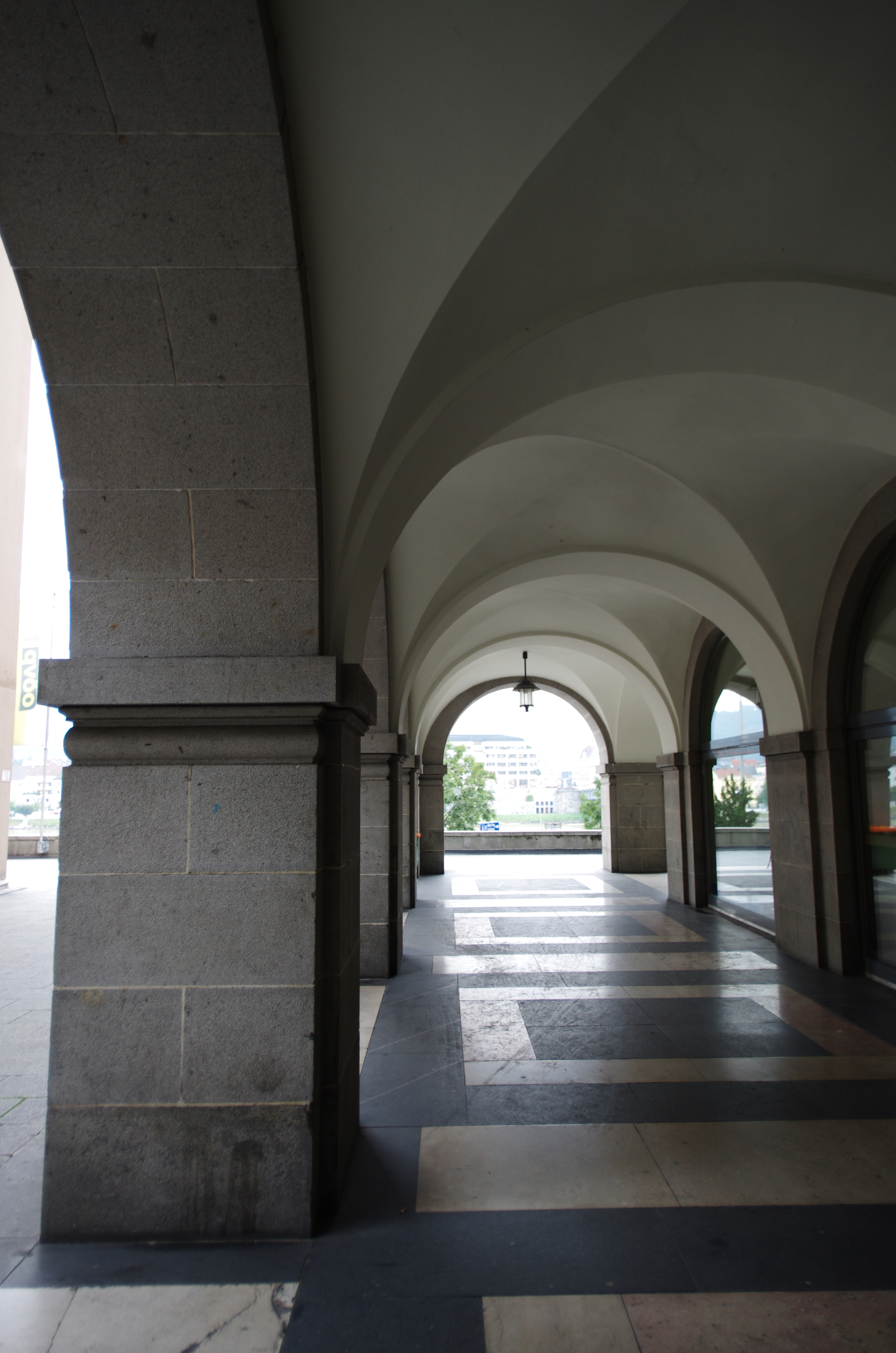 Brückenkopfgebäude West, Kunstuniversität